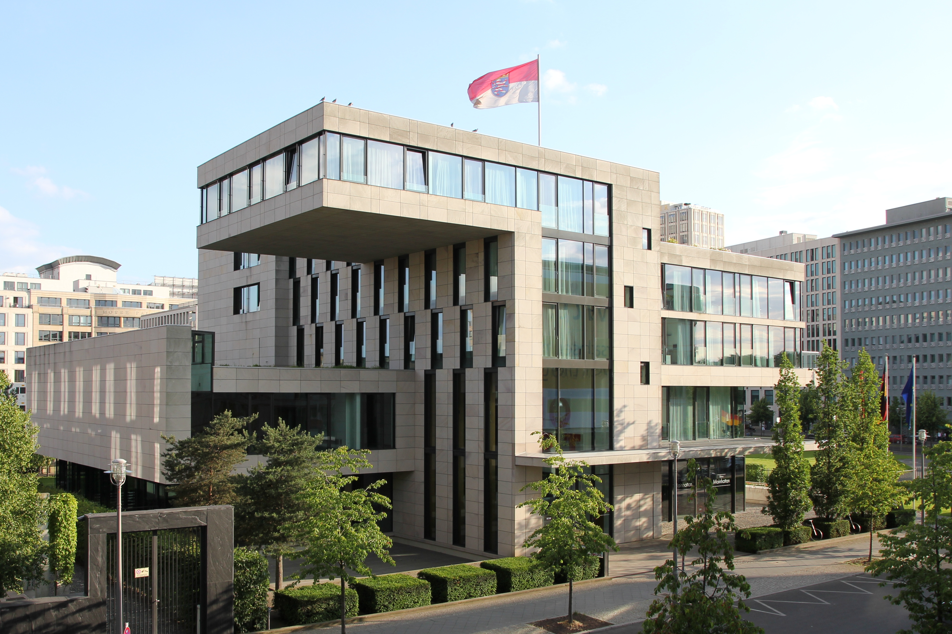 Vertretung des Landes Hessen beim Bund In den Ministergärten 5, Berlin Blick von Nordost Architekten des Gebäudes: Michael Christl und Joachim Bruchhäuser (Frankfurt a.M.)